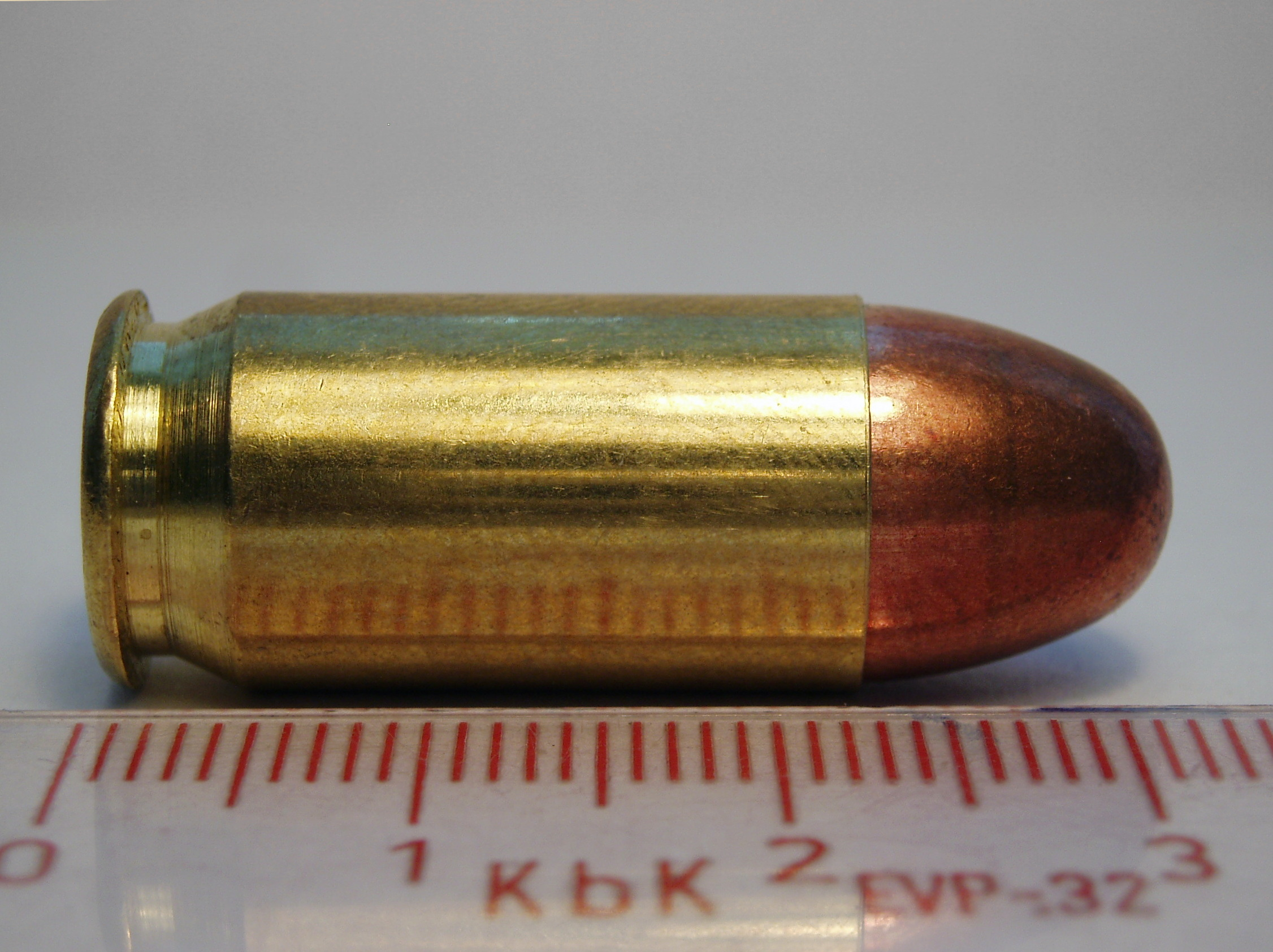 45 ACP pistol cartrdige. FMJ bullet. Manufacturer: Sellier & Bellot.